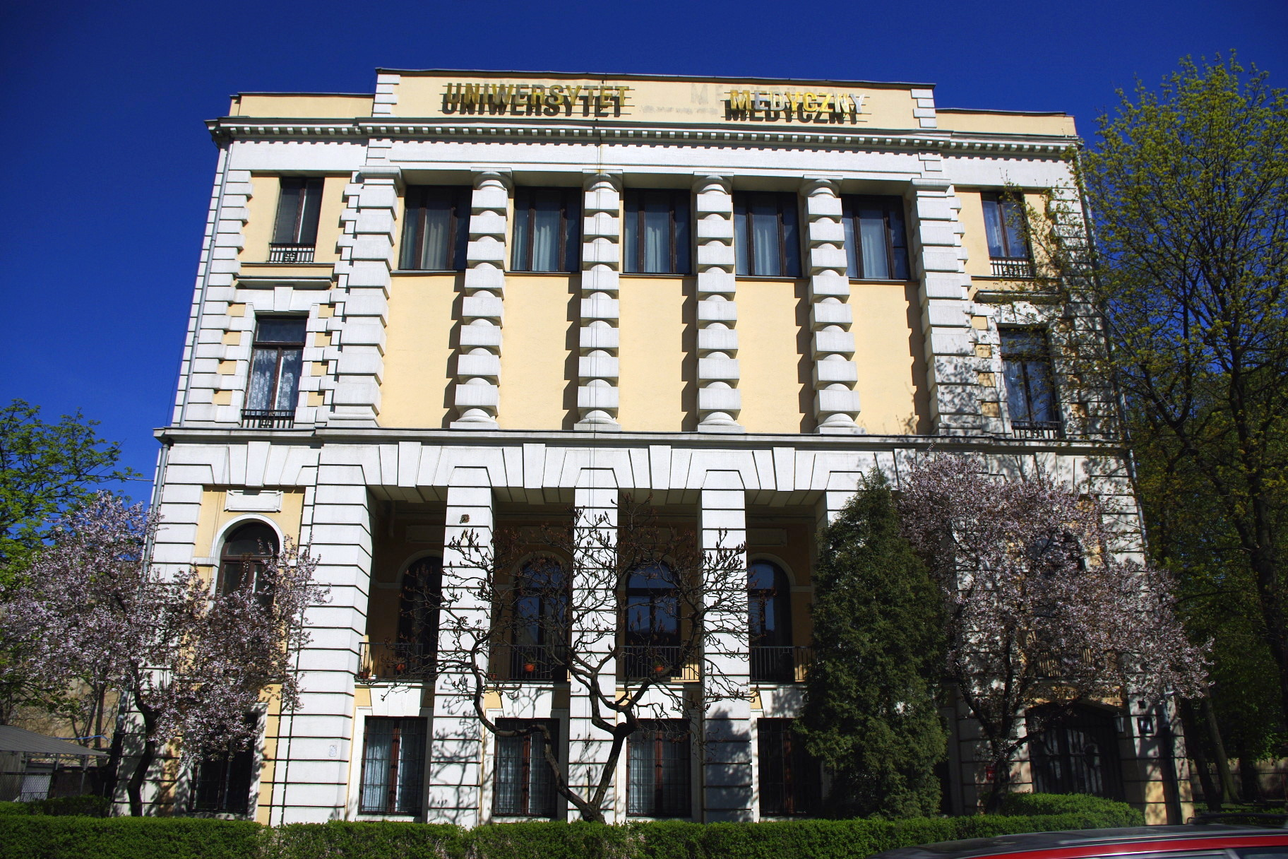 Pałac Jakuba Hertza w Łodzi, al. Kościuszki 4. Rektorat Uniwersytetu Medycznego w Łodzi